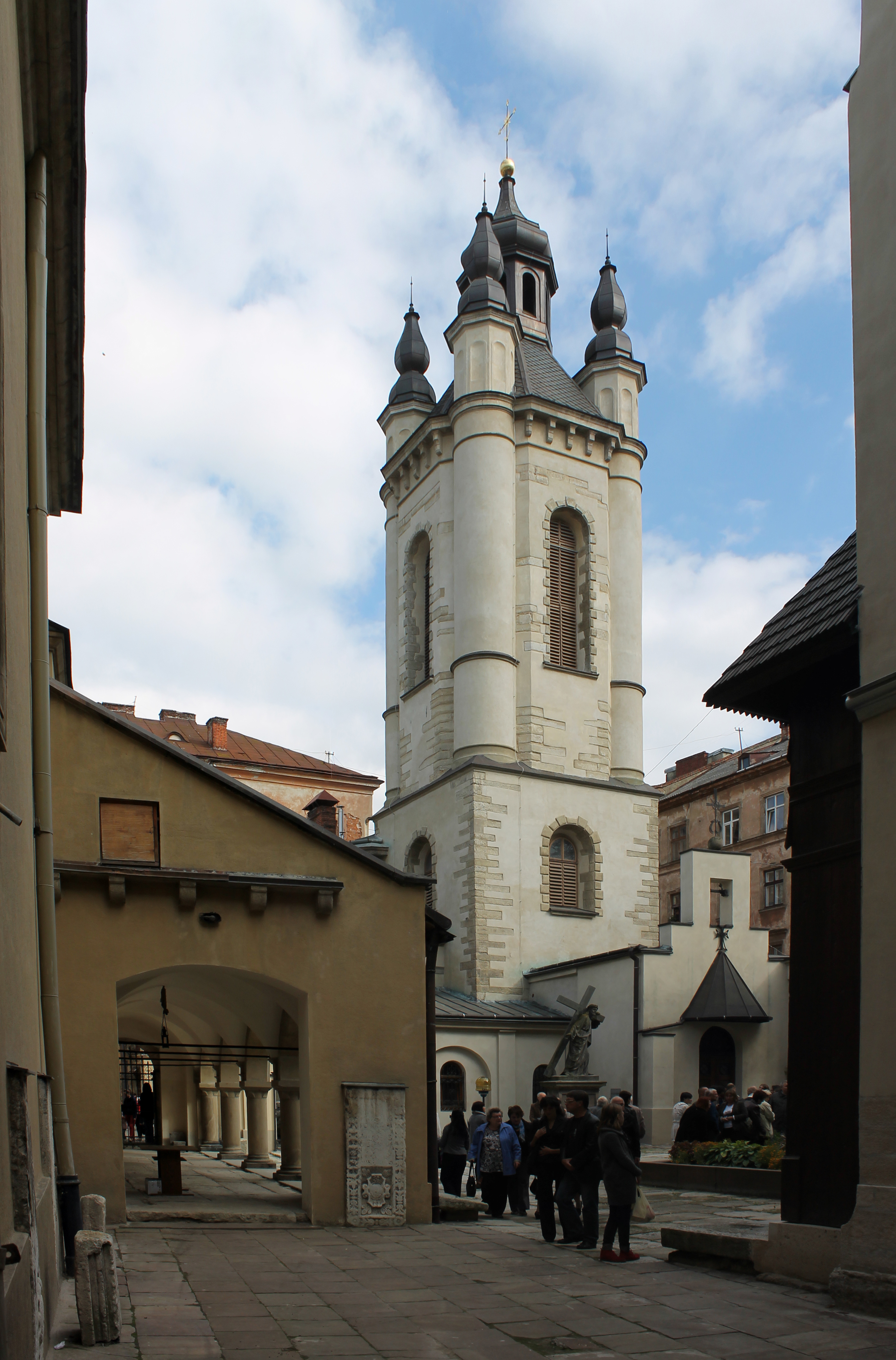 Дзвіниця Вірменського собору 1571-1862рр., вул.Вірменська,7, м.Львів.